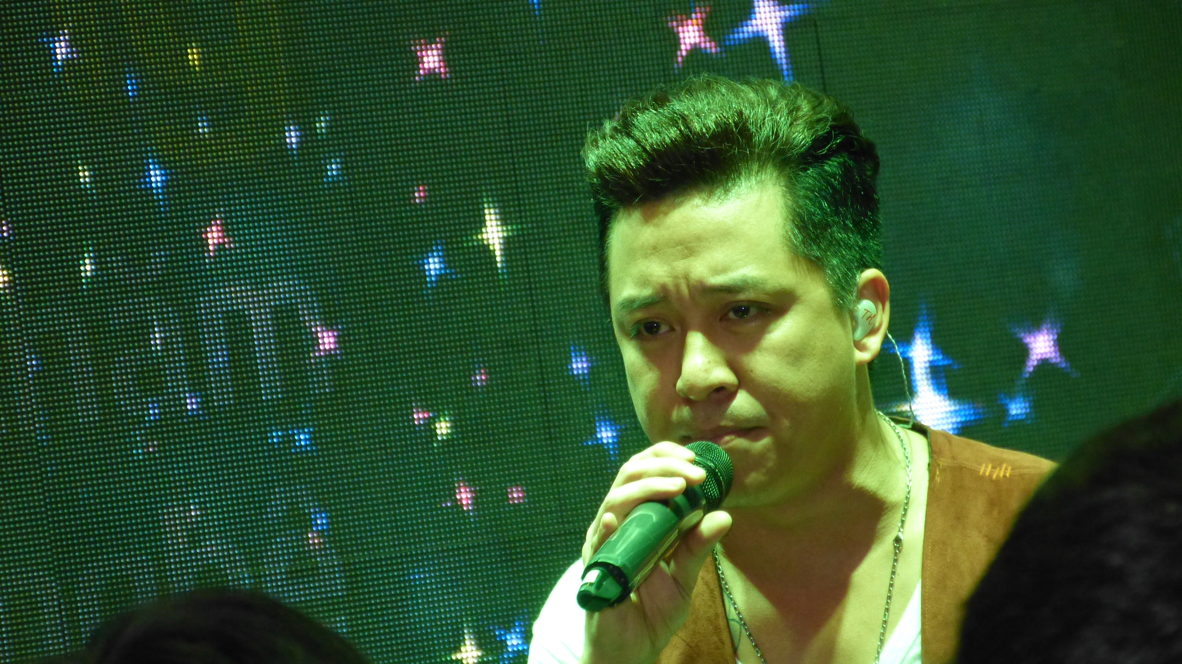 Ca sĩ Tuấn Hưng tại triển lãm Vietnam Telecomp 2013